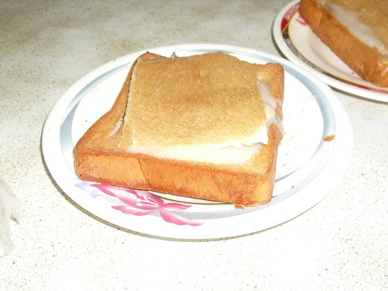 棺材板